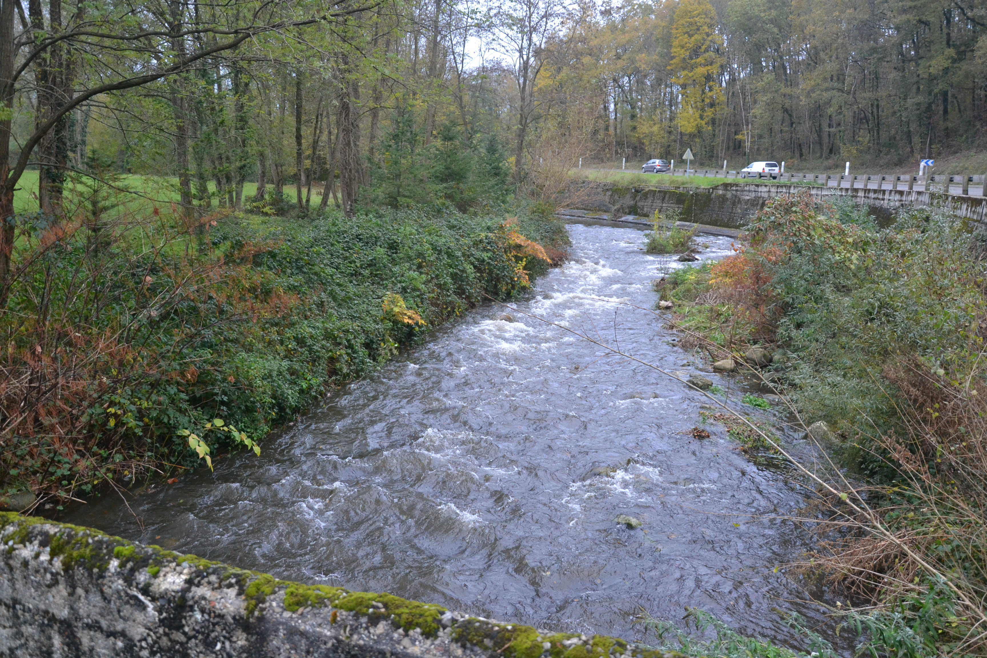 Le Touyre à Dreuilhe (Ariège, France).